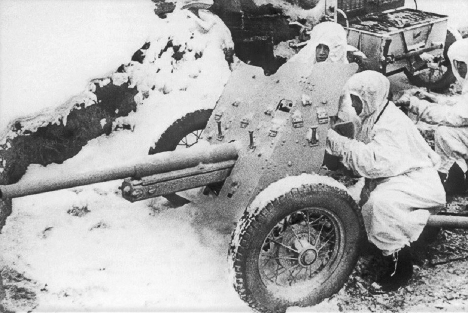 Западный фронт. Расчёт противотанкового орудия младшего сержанта А. Минаева. Слева направо: командир орудия А. Минаев, замковый И. Никитин, заряжающий В. Низамов